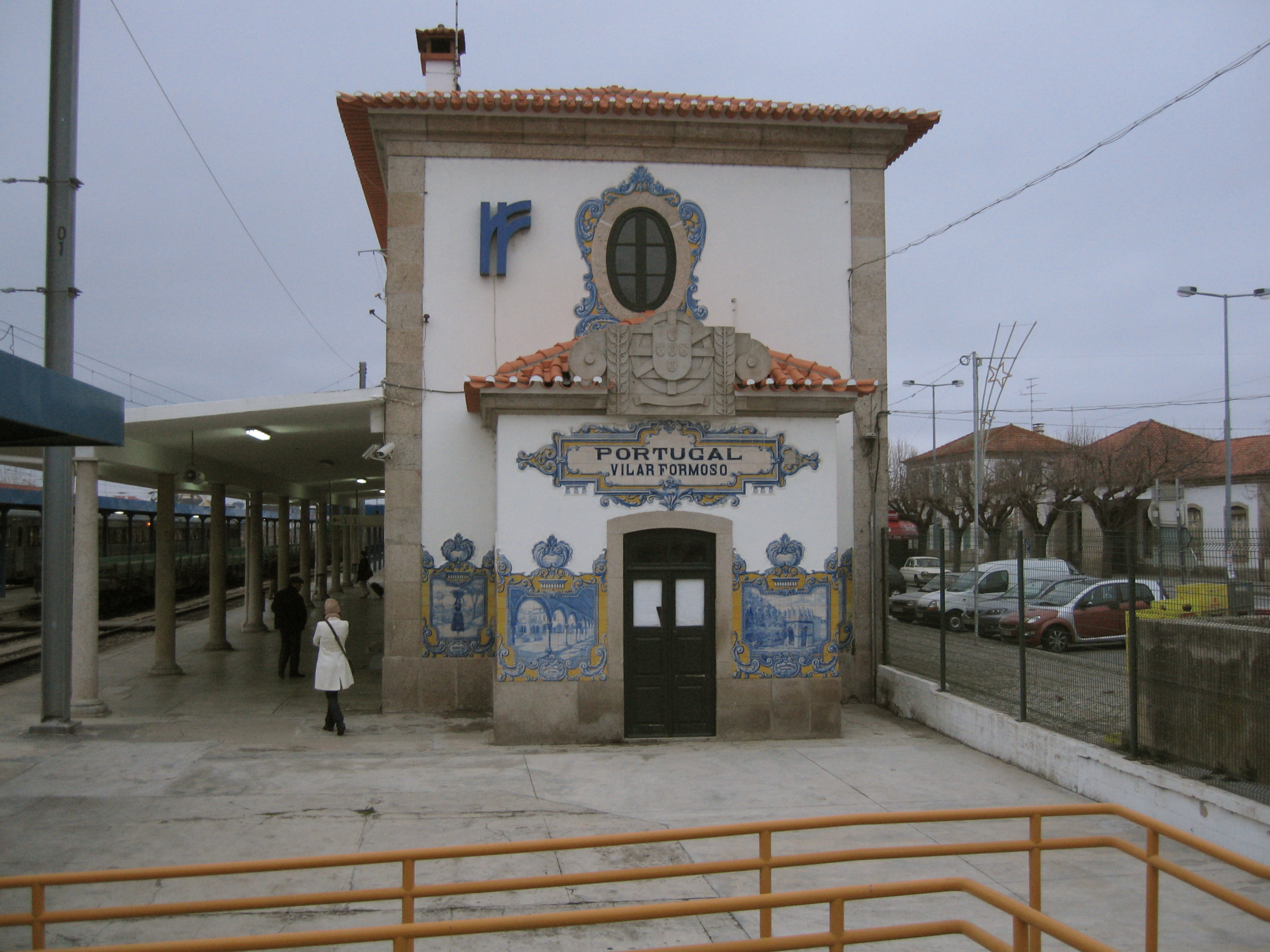 Estación de Vilar Formoso